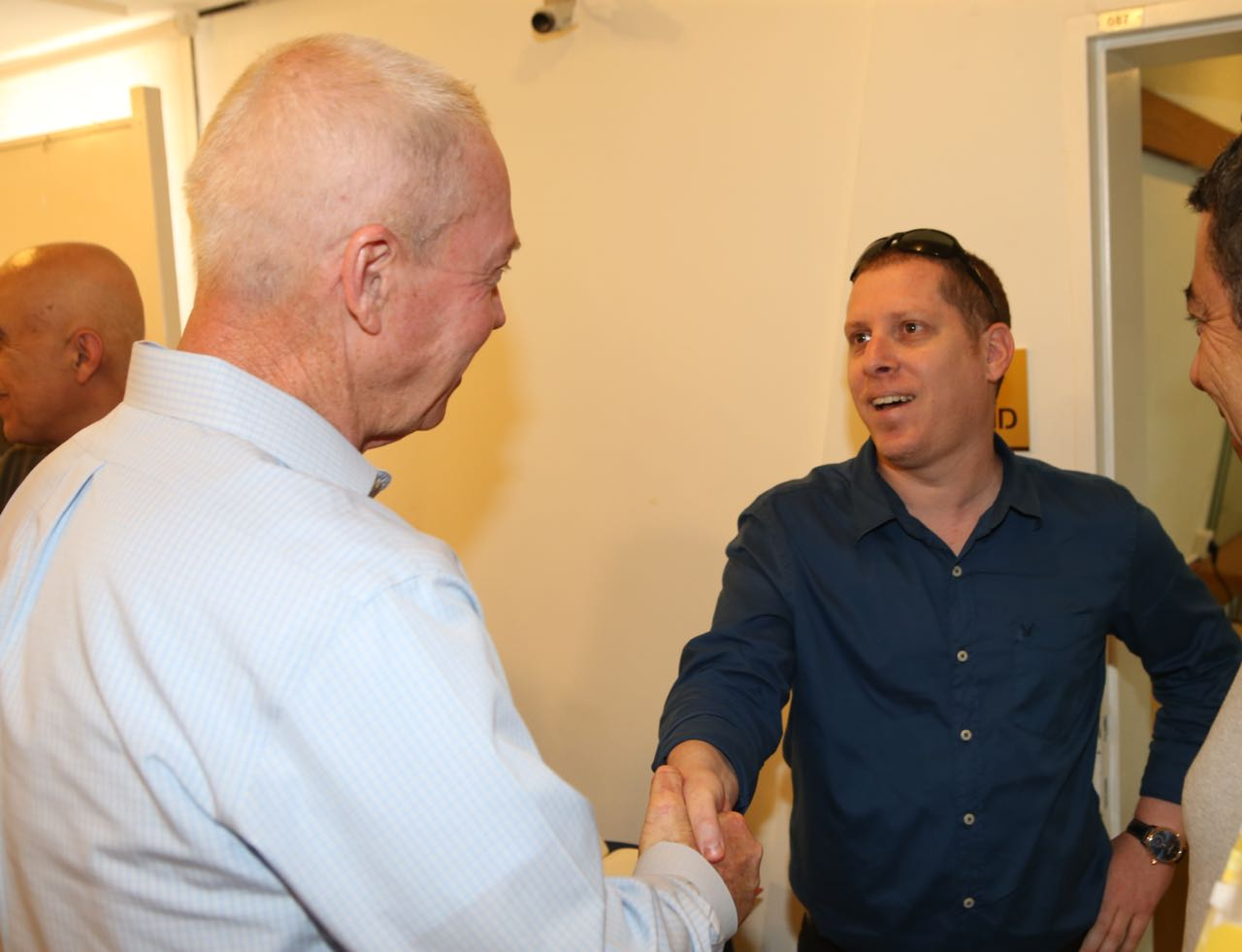 יעוז סבר, דובר עיריית רעננה, מקבל את פניו של השר יואב גלנט בביקורו בעיר ב-2017